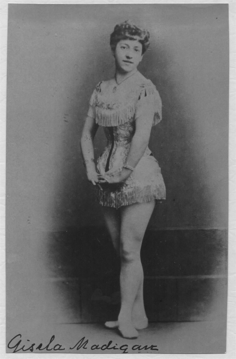 Cirkusartisten Gisela Brosch (Cirkusarkivet, Stockholm)